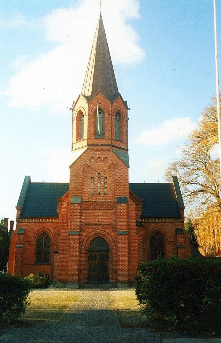 Sankt Andreas Kirke (katolsk), Gentofte Kommune